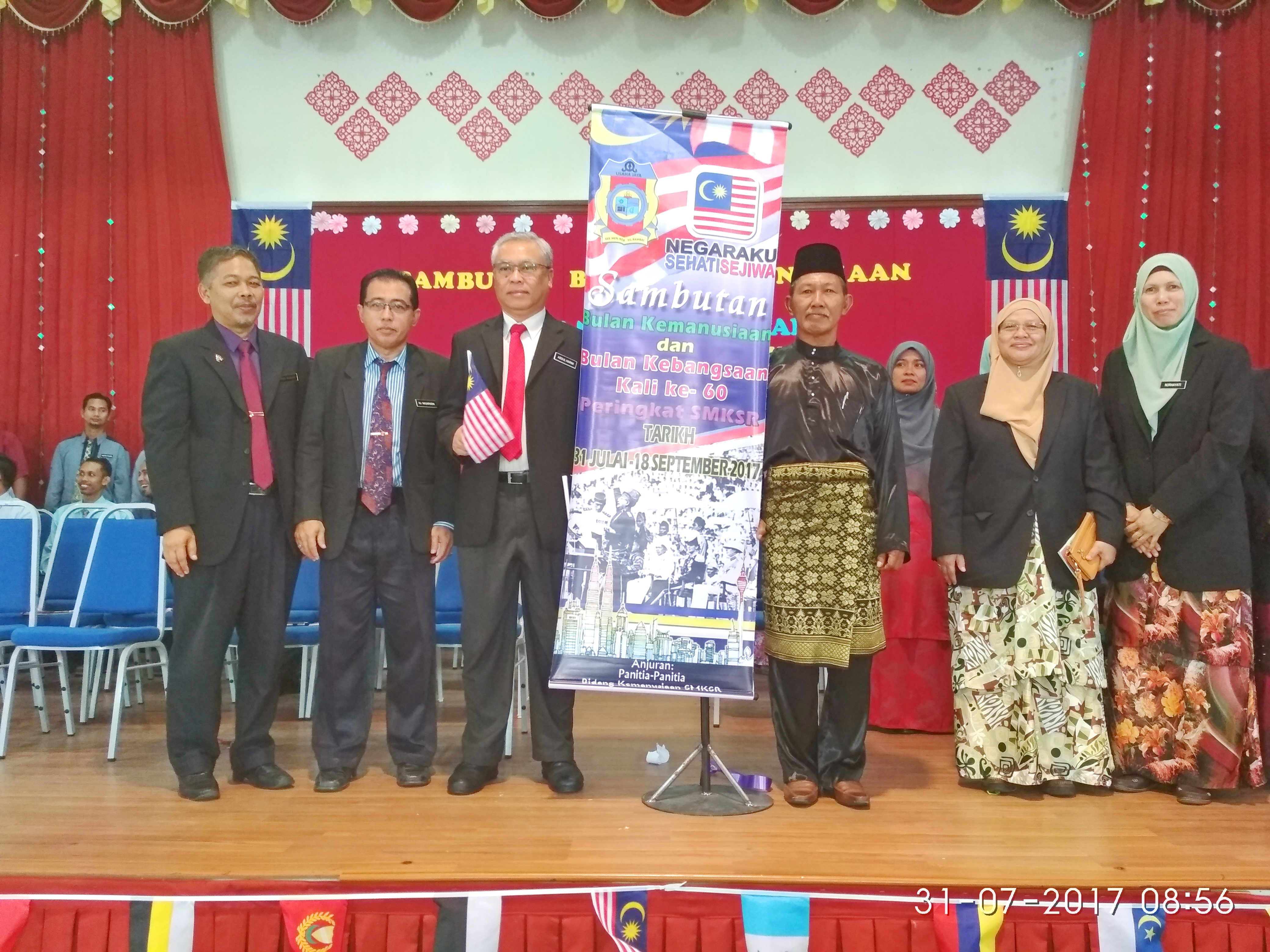 gambar kenangan bersama perasmi